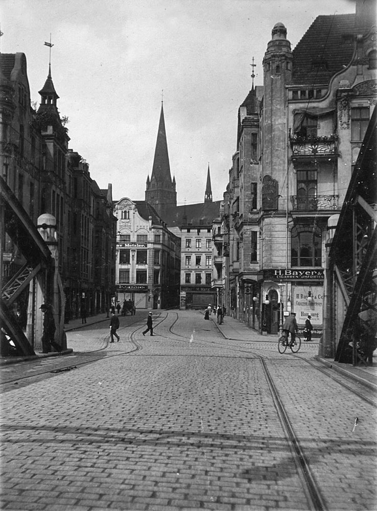 Splittstraße 1907 - Szczecin